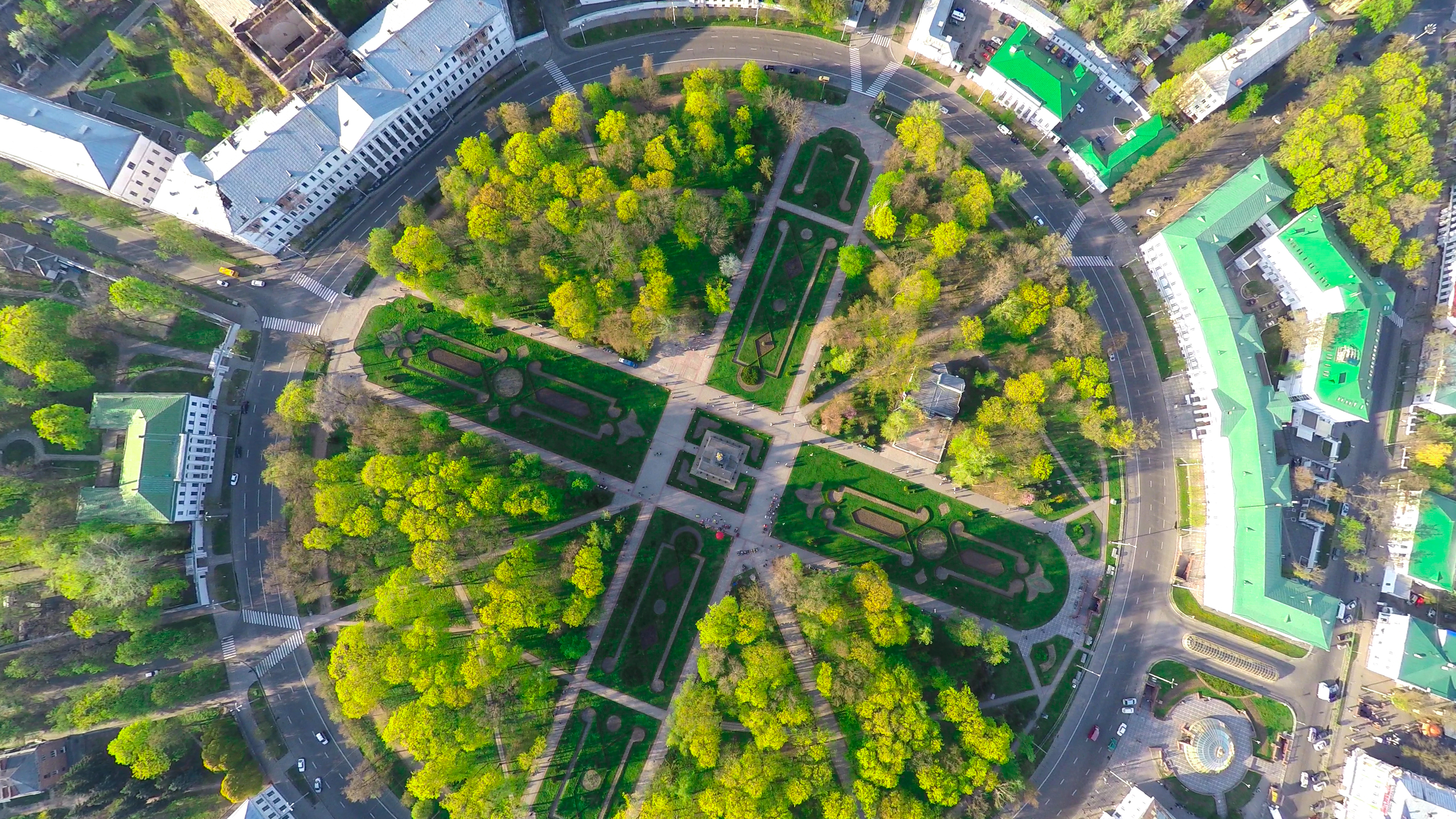 Ансамбль Круглої площі, Полтава, Вул. Жовтнева